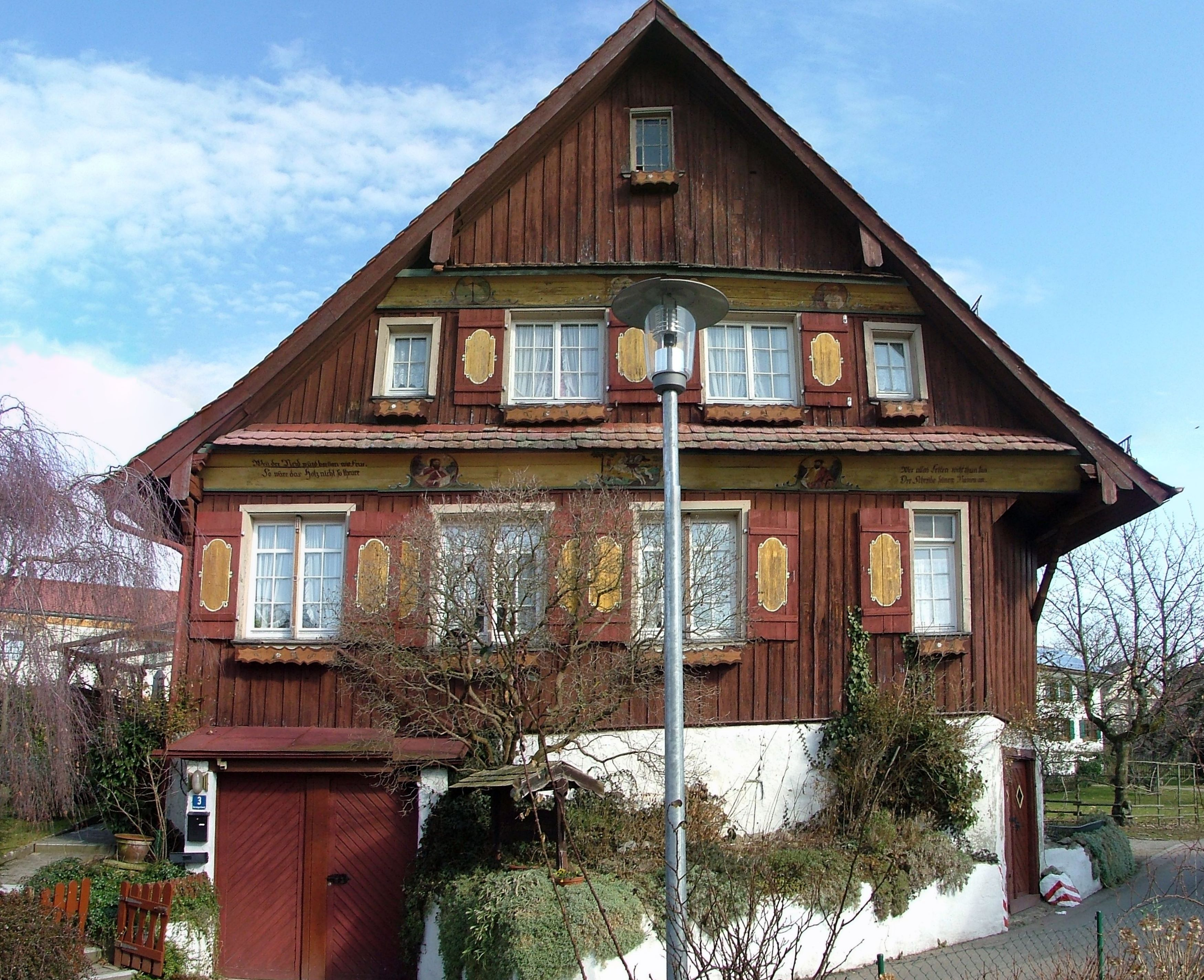 Alte Schule